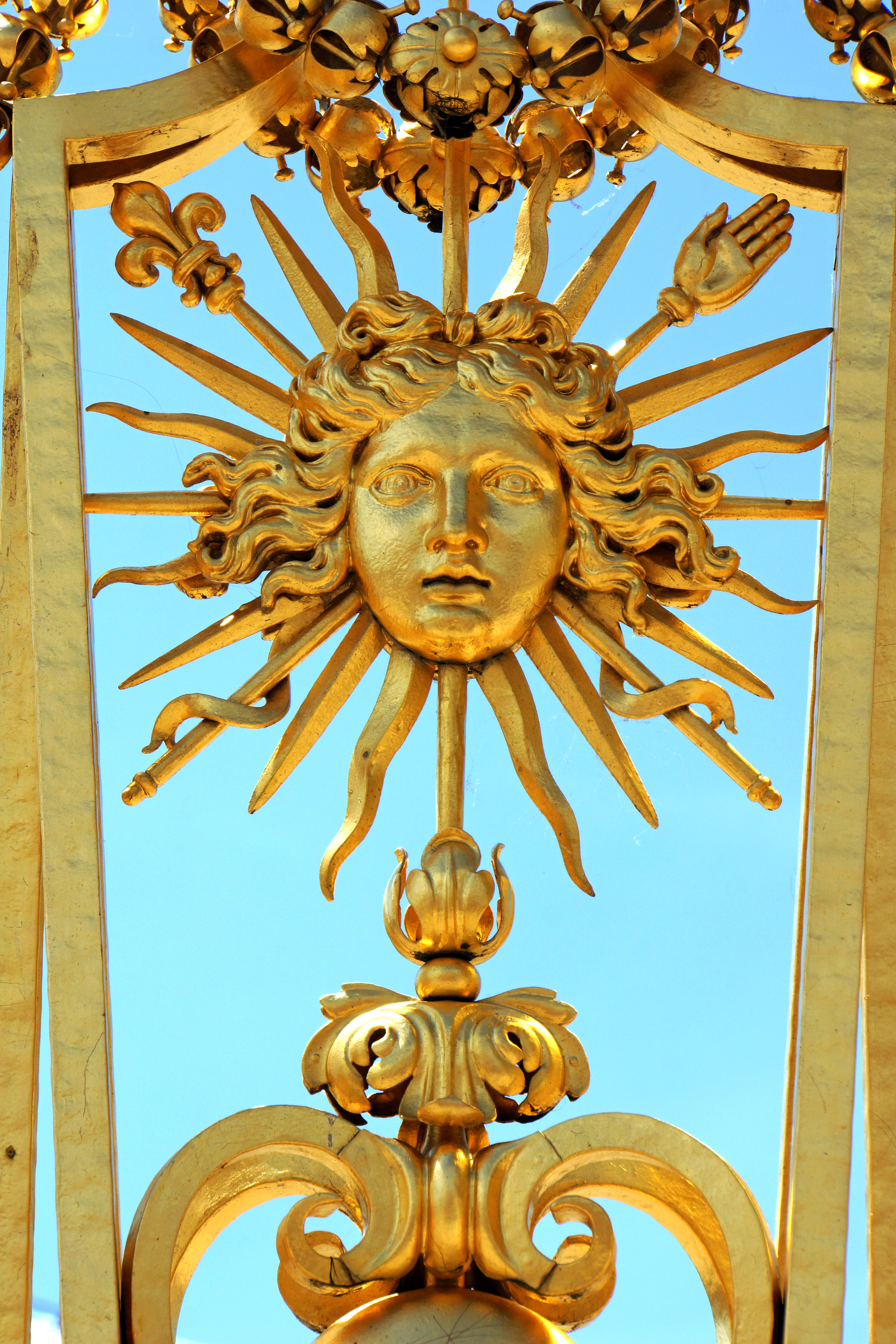 Grille royale of Versailles, France.